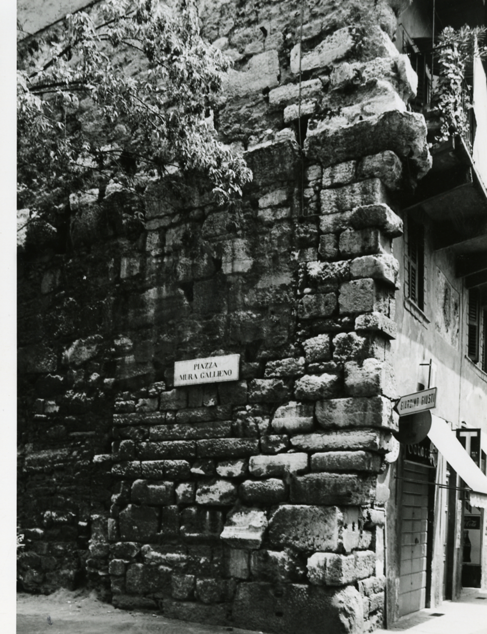 Servizio fotografico : Verona, 1972 / Paolo Monti. - Stampe: 2 : Positivo b/n, gelatina bromuro d'argento/ carta, 24x30. - ((Sul coperchio della scatola iscrizione didascalica manoscritta a pennarello nero: "Verona". - Occasione: Documentazione per la pubblicazione: Brugnoli Pier Paolo, "Nella bella Verona", Bologna, Cappelli, 1972. - Fonte: Quaderno di Paolo Monti: Leica 1501-3000 Controllo numerazione (1950-1978), presso Archivio Paolo Monti. - Fonte: Monografia di Brugnoli, Pier Paolo: Nella bella Verona, Bologna, Cappelli (1972). - Fonte: Fattura di Paolo Monti: IV. Commesse/ Fattura/ Fotografie per illustrazione del volume Verona (1972/12/20), presso Archivio Paolo Monti. N. 292 riprese fotografiche della città di Verona in formato 24x30